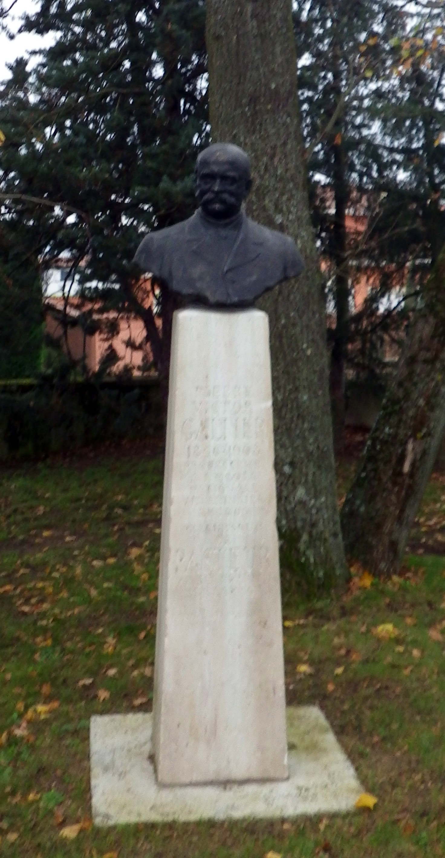 Stèle hommage à Victor Galtier, précurseur de Louis Pasteur dans la découverte du vaccin contre la rage